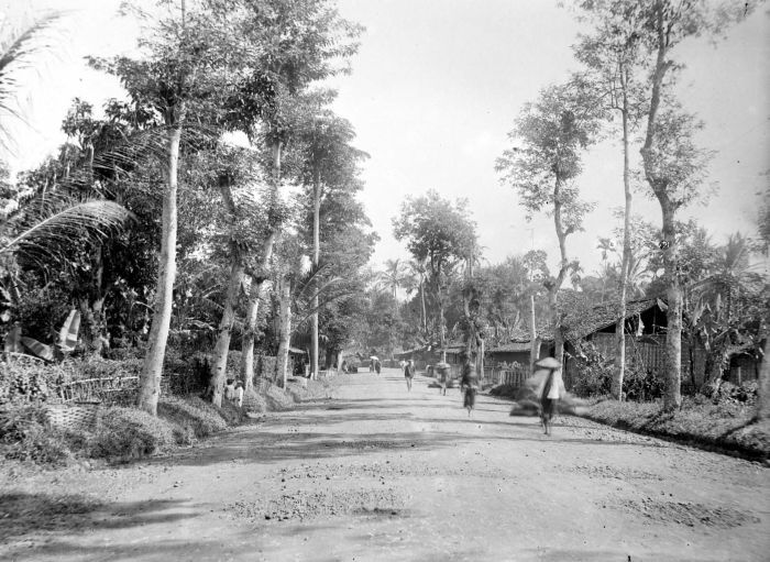 Repronegatief. De Groote Postweg bij Kampong Tjibabat, West-Java